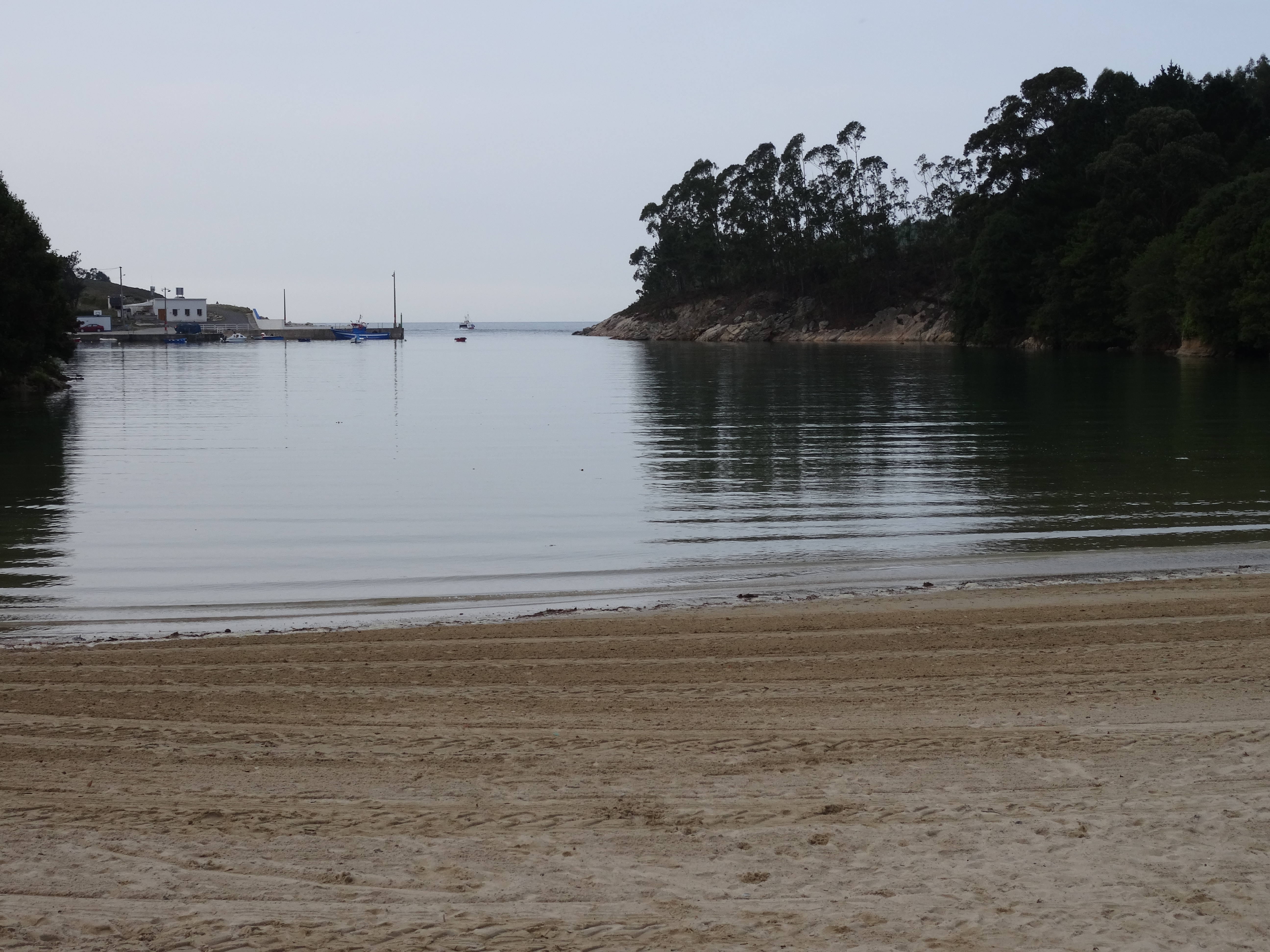 Ver nome.